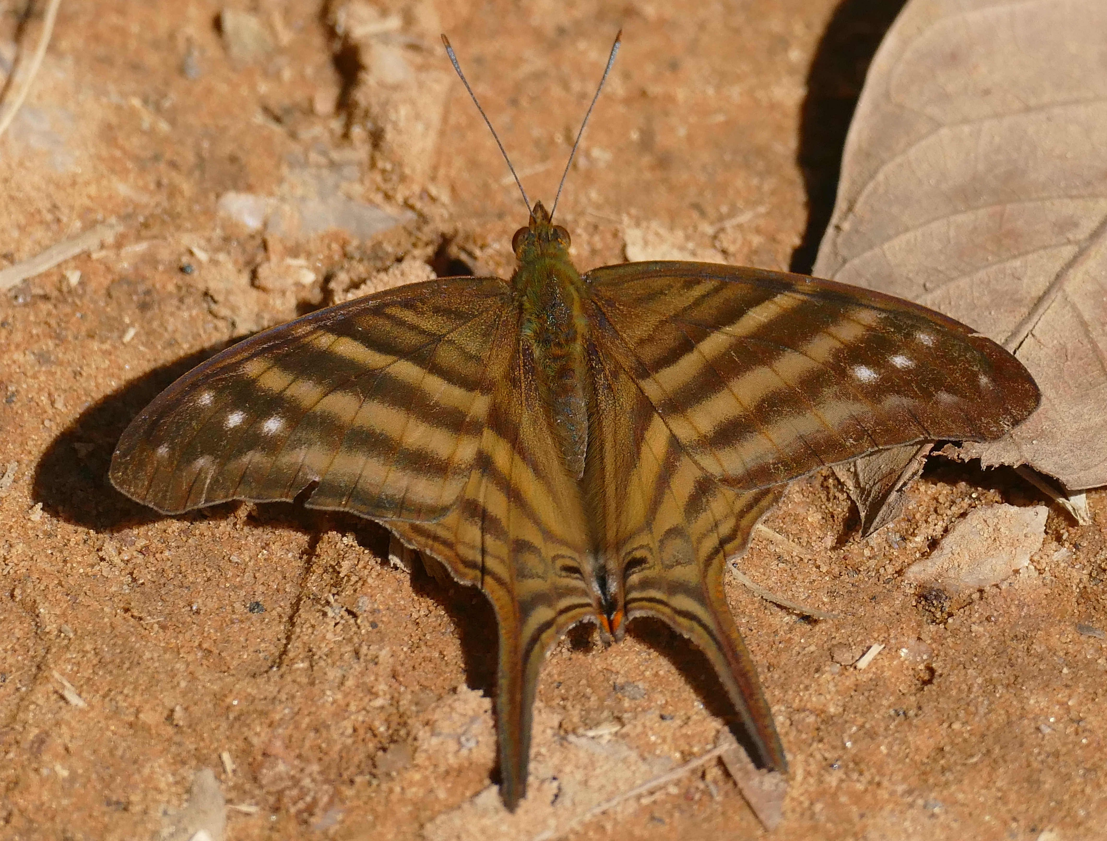 Pousada do Neco, Porto Jofre, Transpantaneira, Poconé, Mato Grosso, BRAZIL